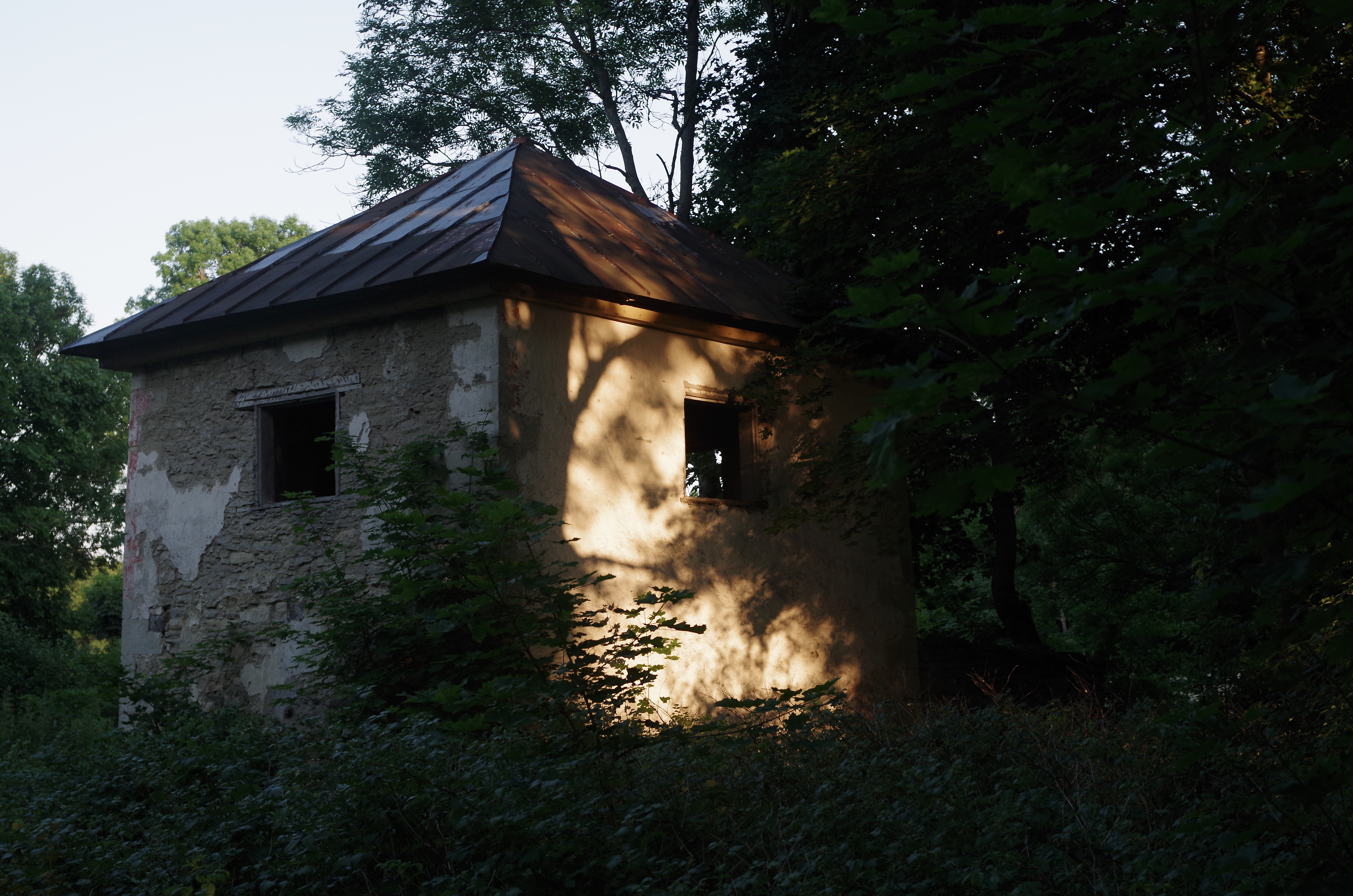 Pilt aastast 2014. Kasti küla, Kaarma vald, Saare maakond.